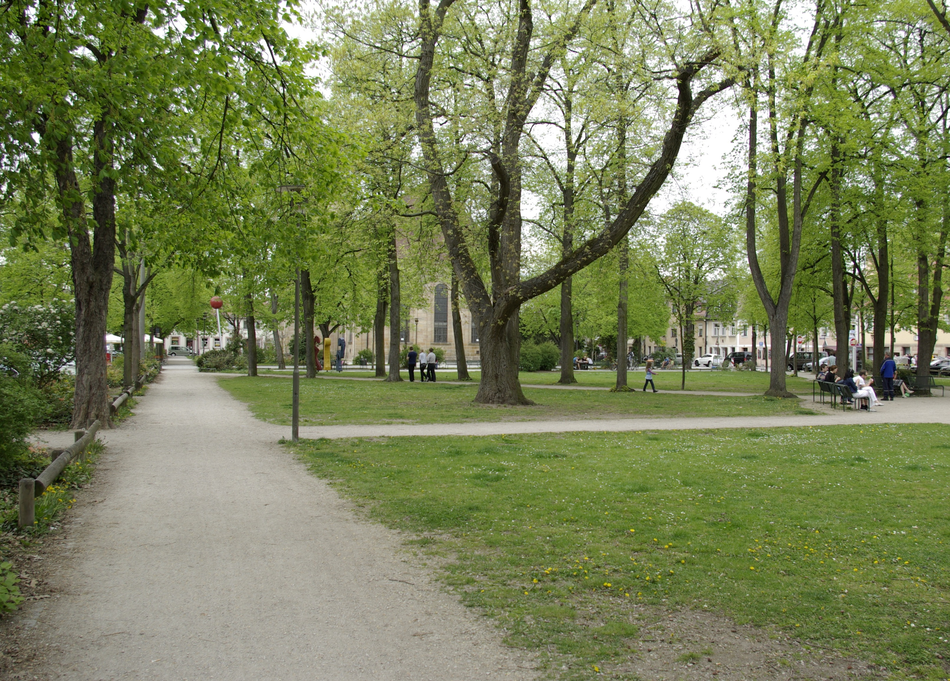 Der Bohlplatz in Erlangen